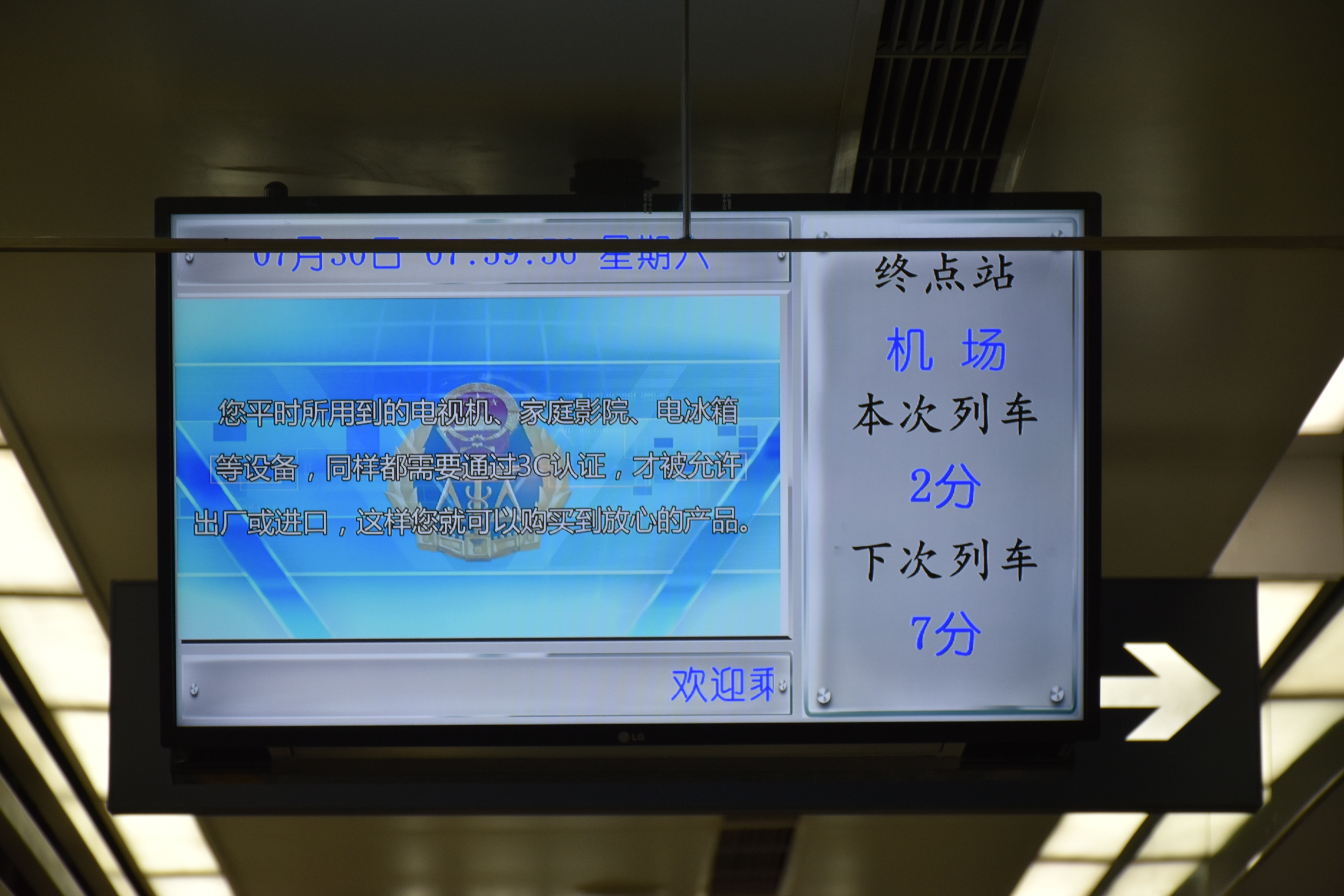 大连地铁2号线人民广场站内PIS显示屏。